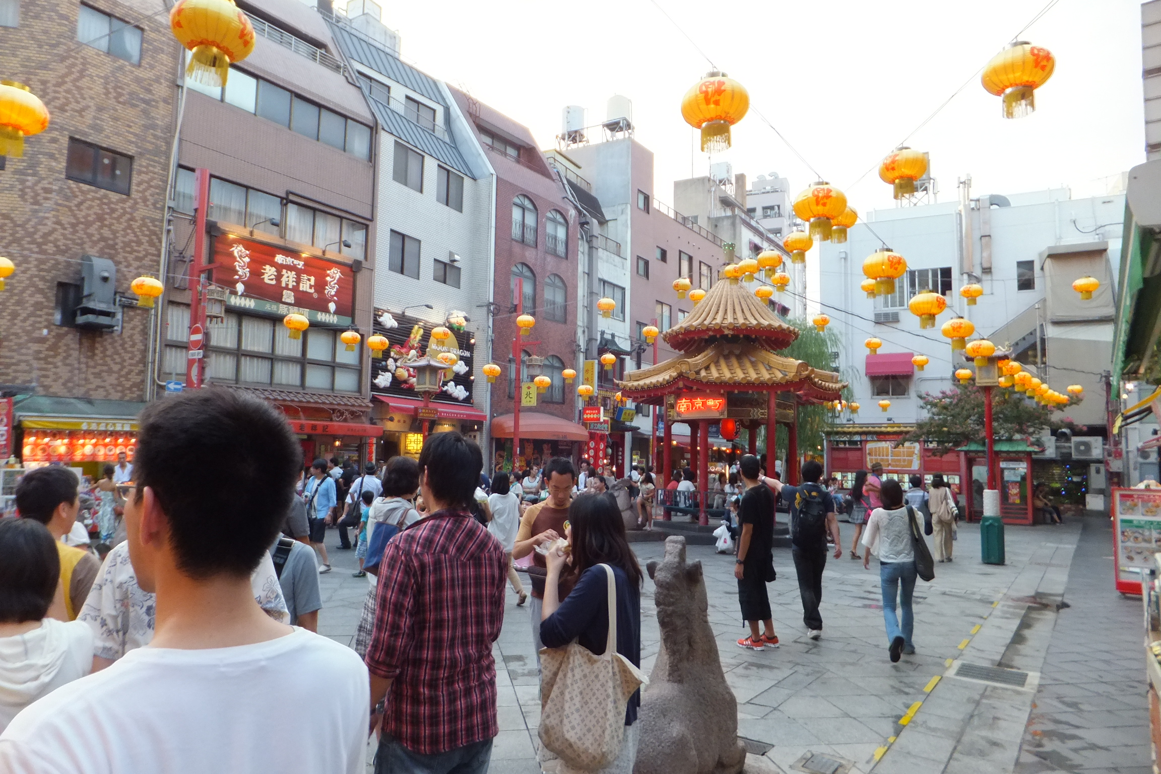 神戸南京町（2013年8月11日制定）